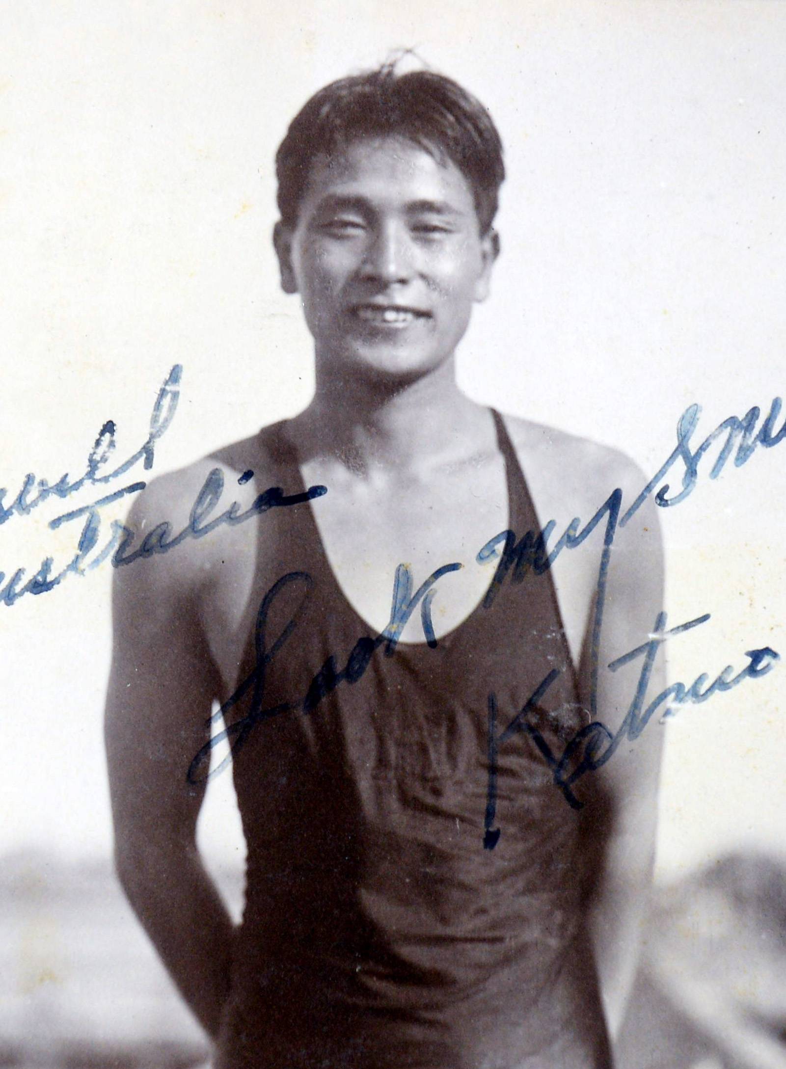 Katsuo Takaishi